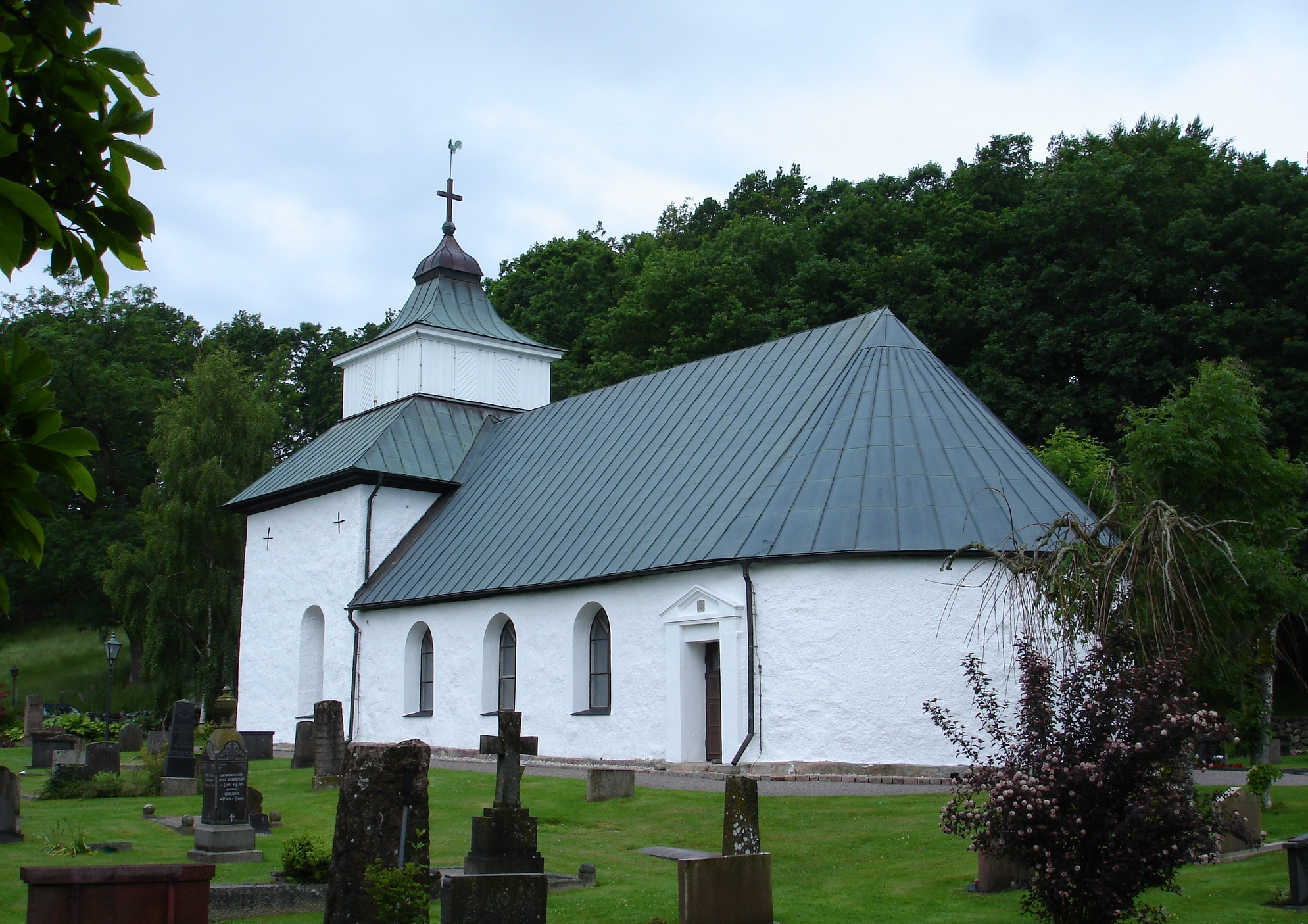 Steninge kyrka i Halland